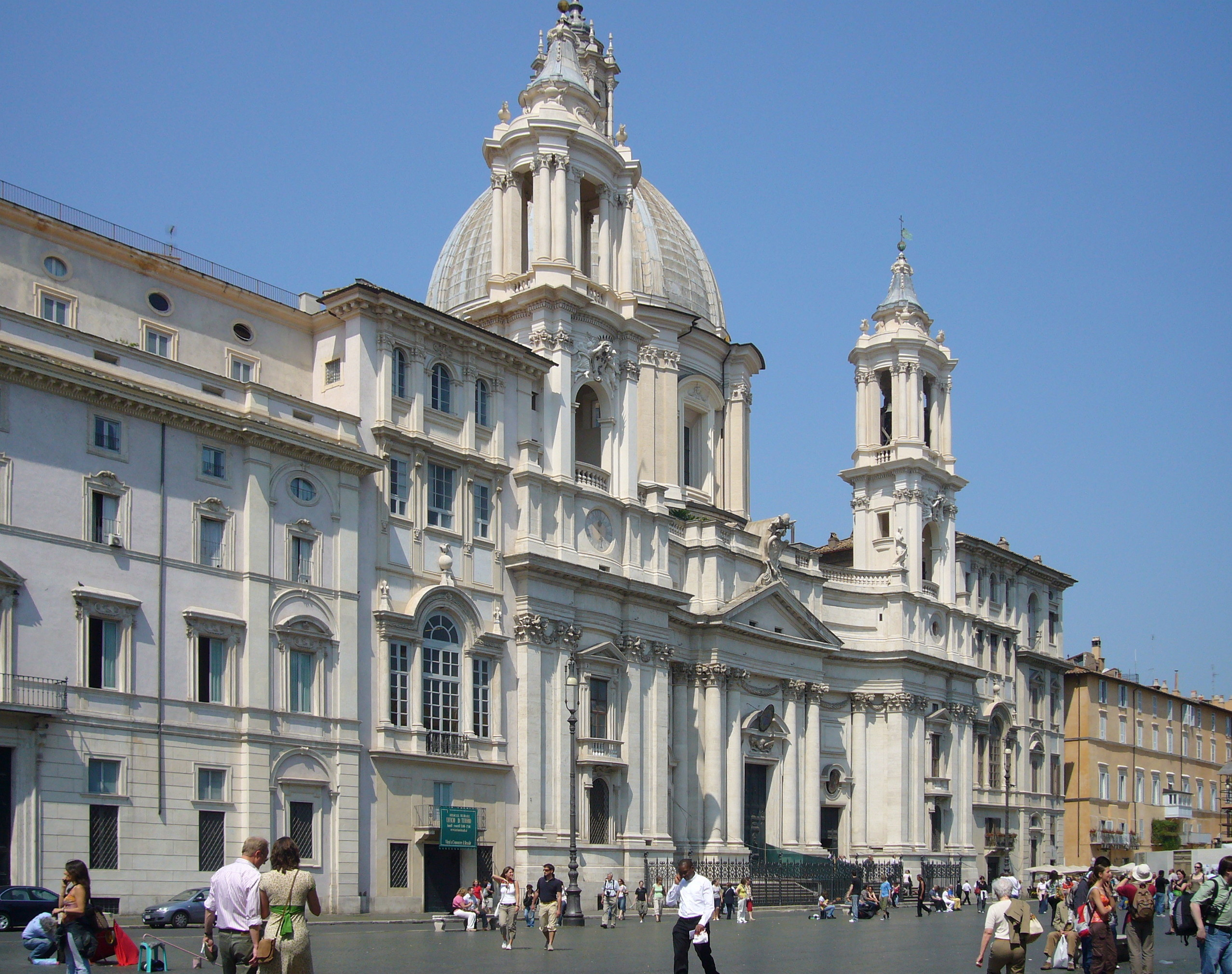 Roma, Sant'Agnese in Agone a Piazza Navona